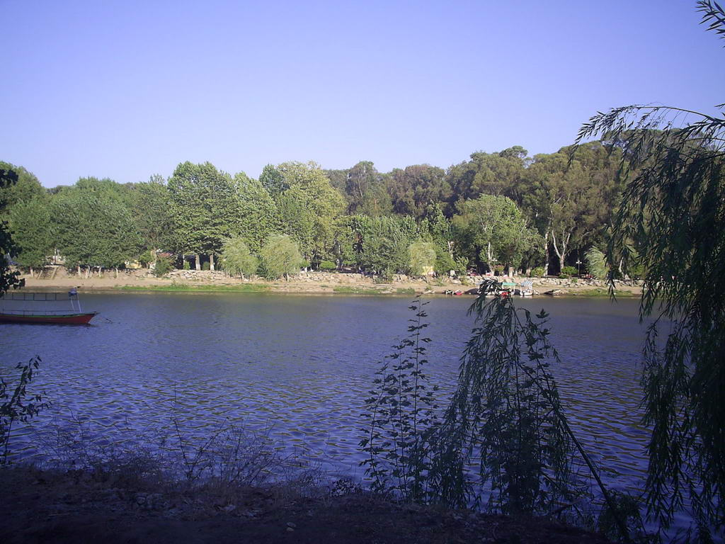 El río Claro, a su paso por el Balneario homónimo, un tradicional paseo de Talca.